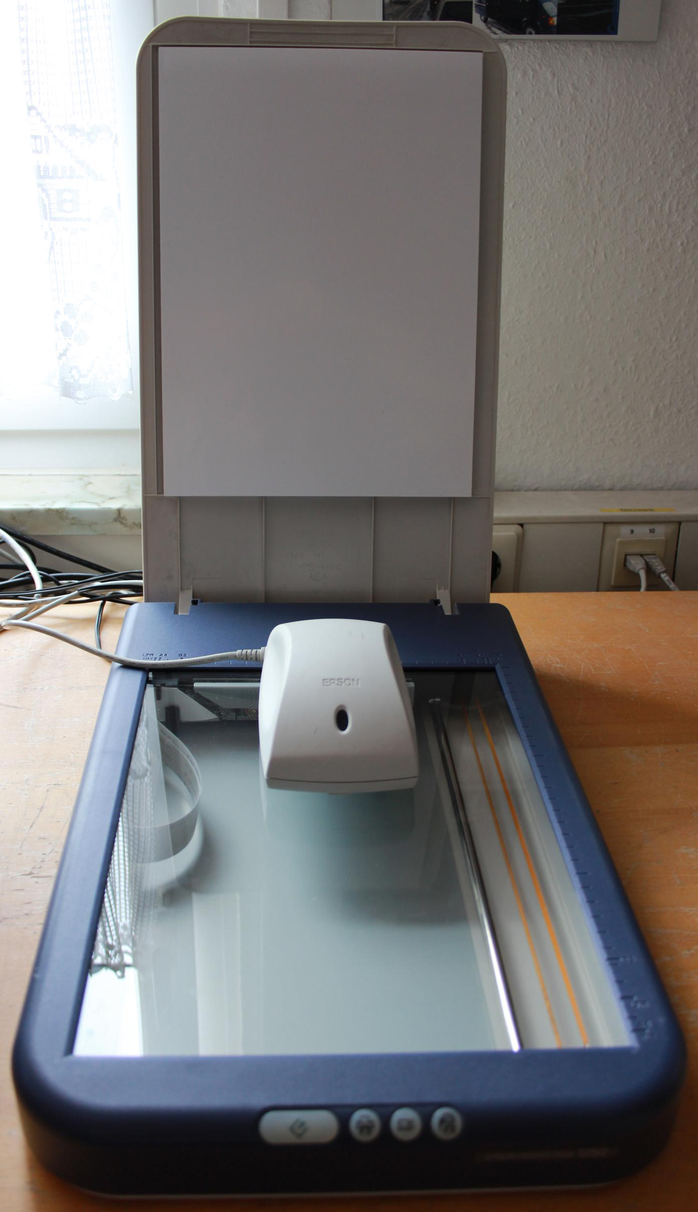 Epson-Flachbettscanner mit Durchlichteinheit